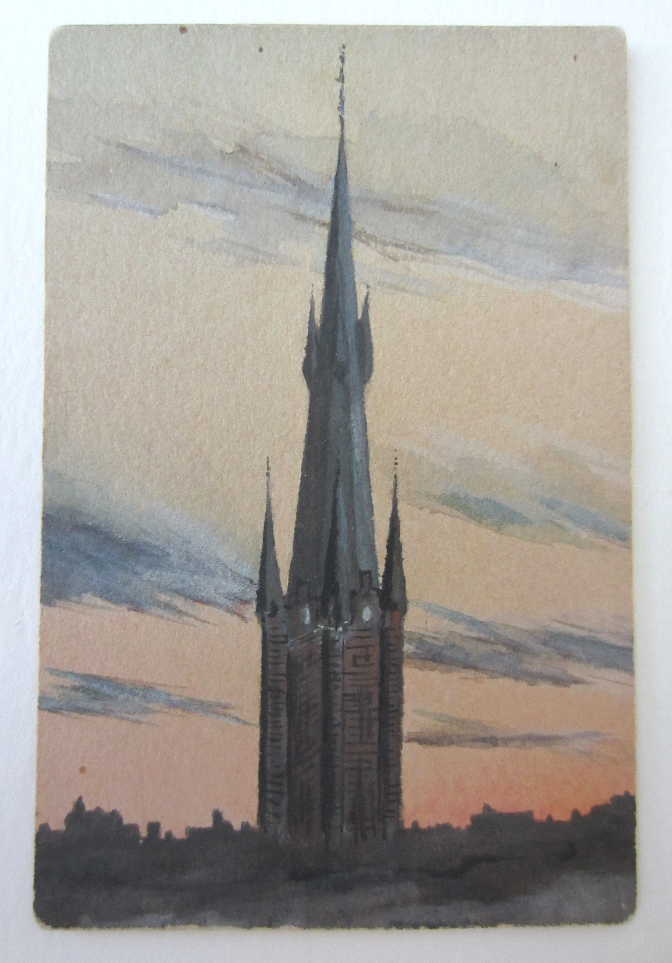 Hjalmar Söderbergs akvarell av S:t Klara kyrktorn från 1884